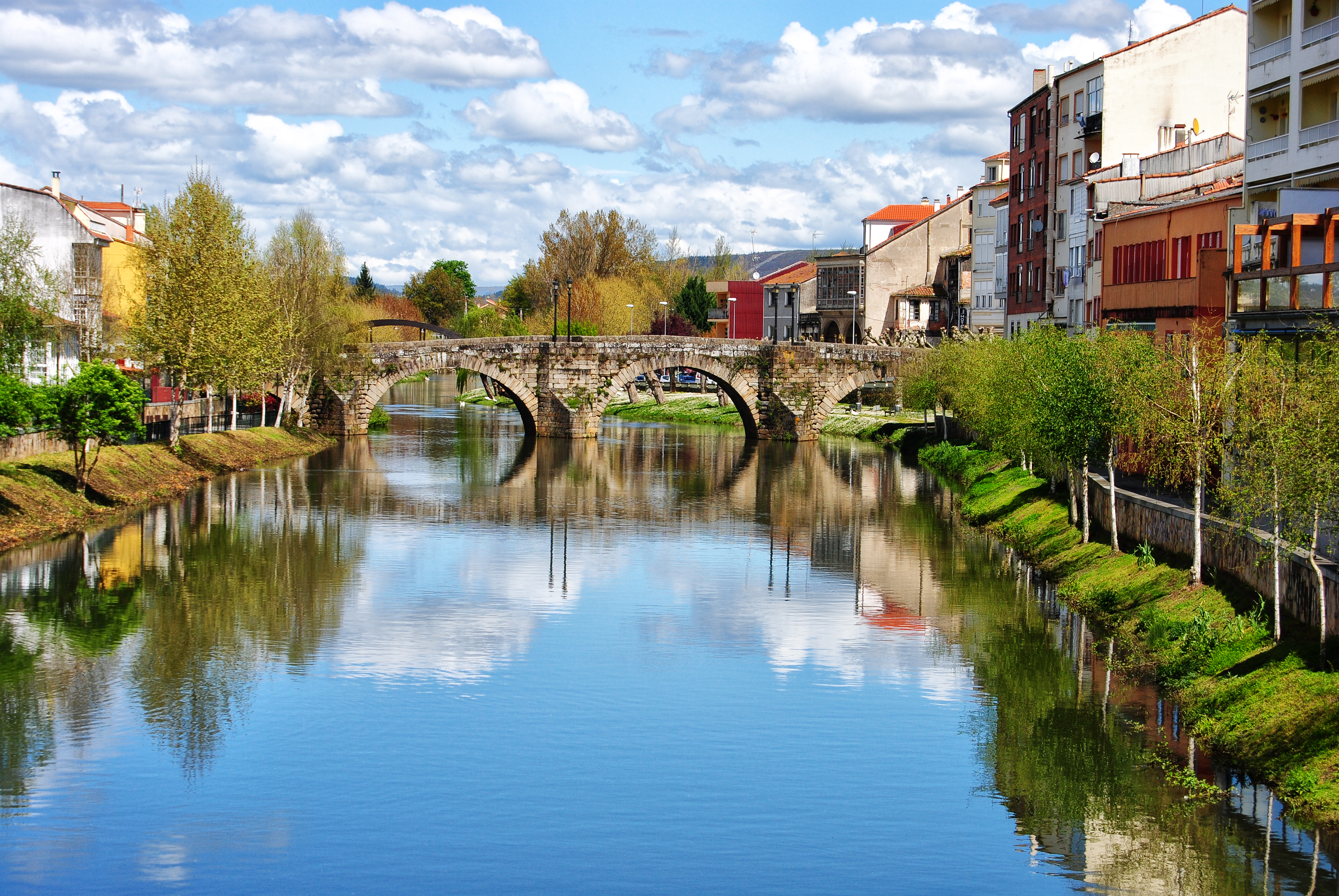 Ponte Vella sobre el río Cabe a su paso por Monforte de Lemos.